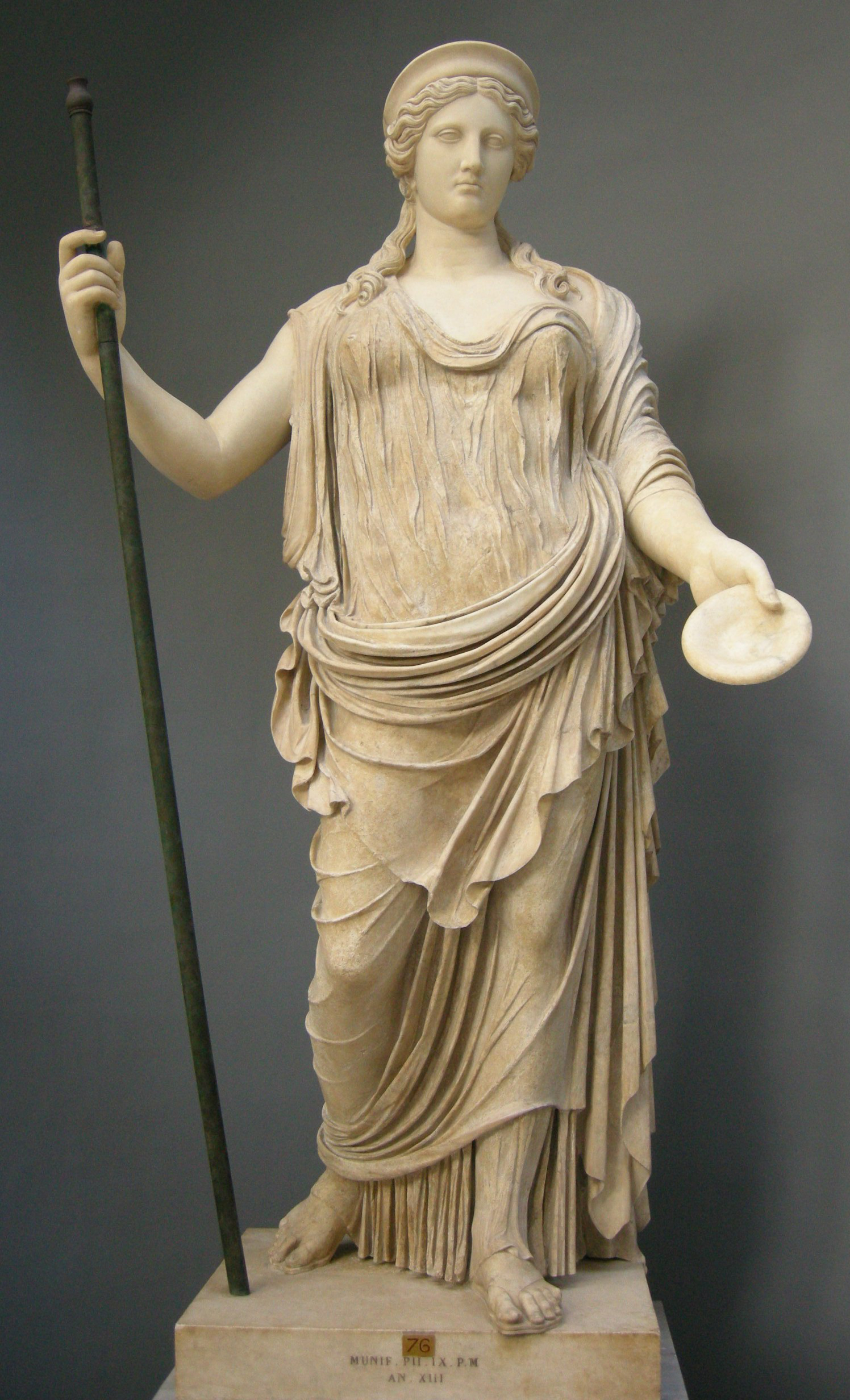 Divinità sul tipo della hera borghese Barberini, copia romana da originale della scuola di fidia, da tor bovacciana (ostia), inv. 2246